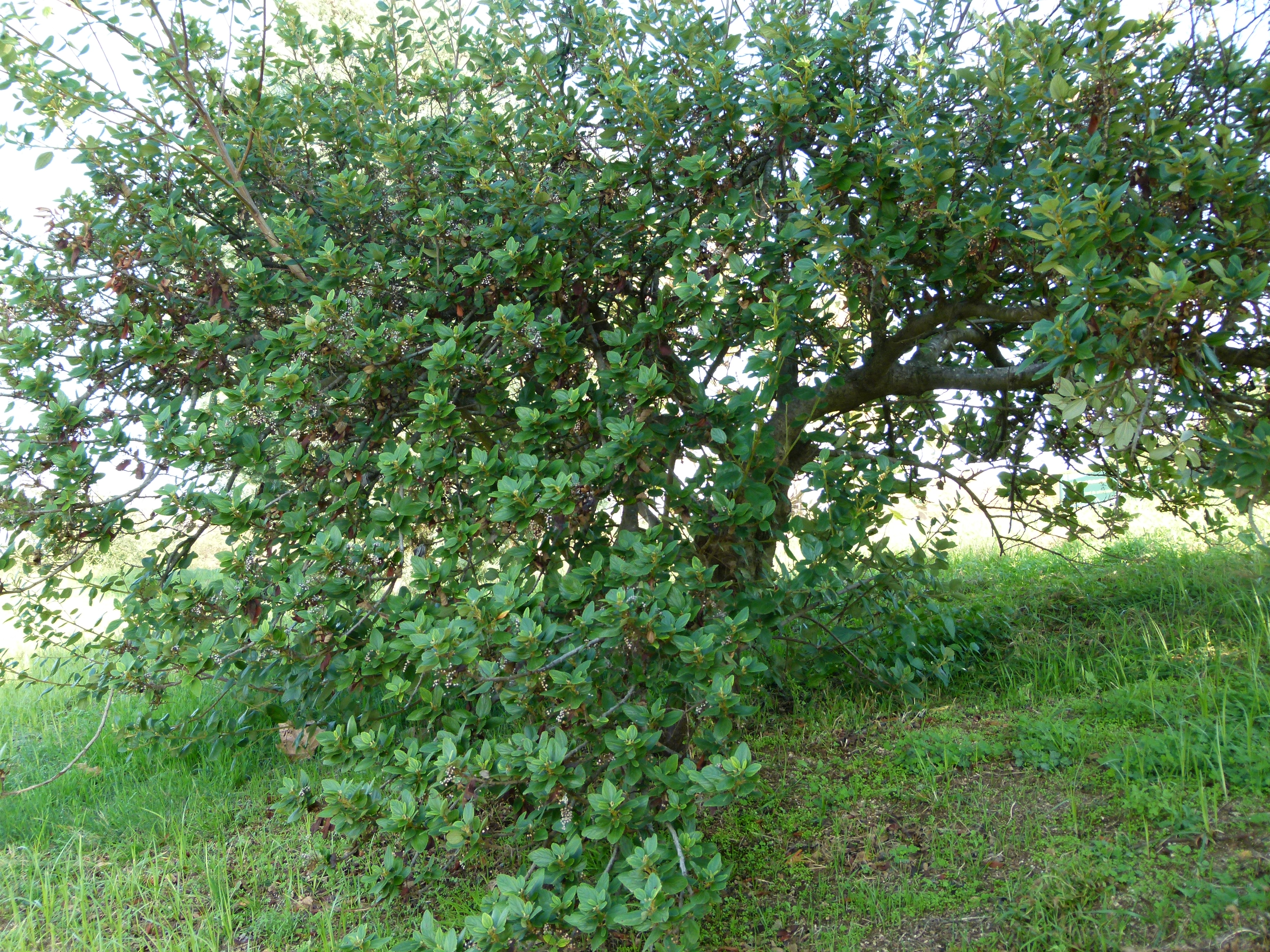 Jardin botanique Barcelone